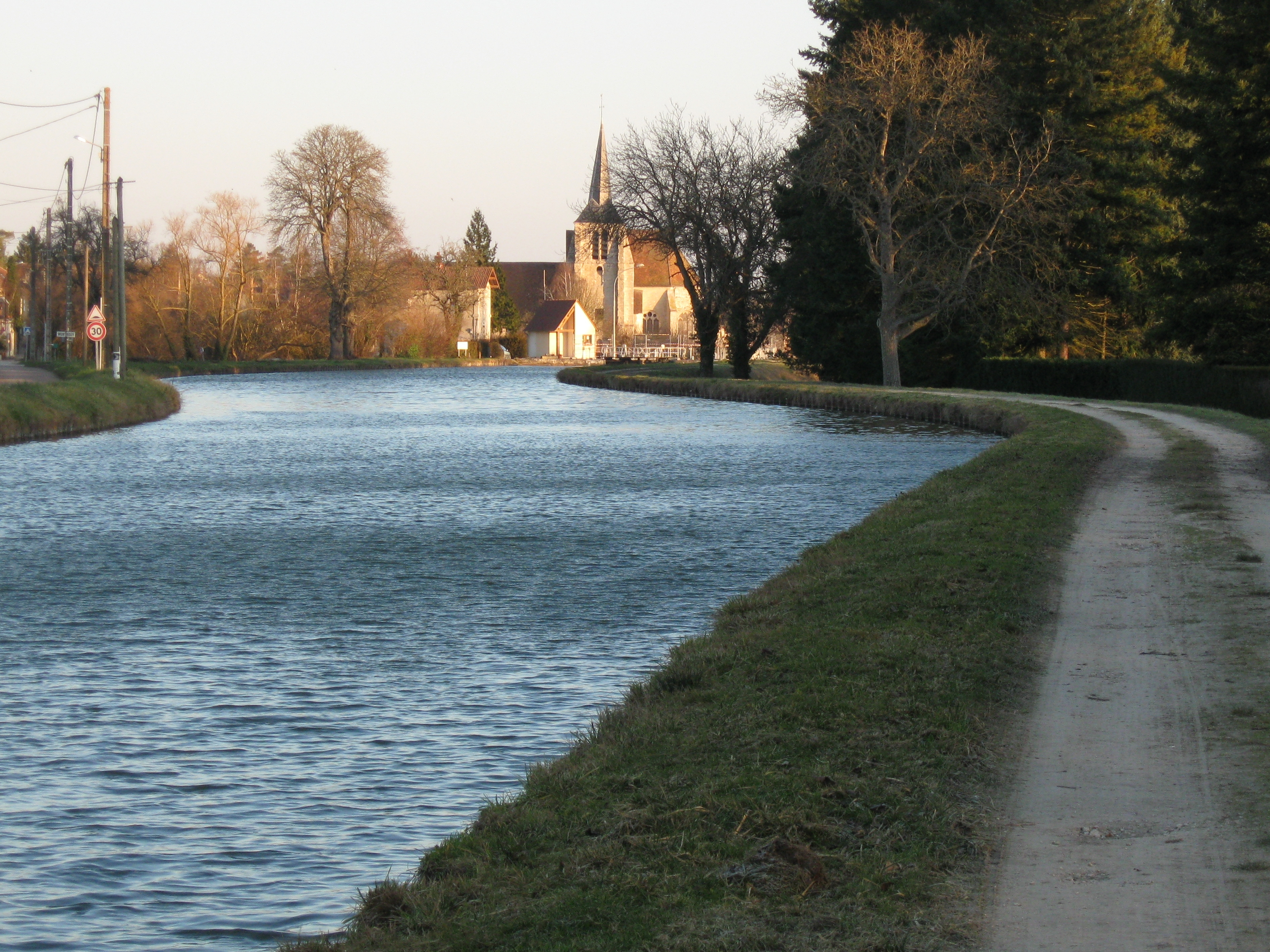 Montbouy (son église), vue du sud, depuis le chemin de halage du canal de Briare.